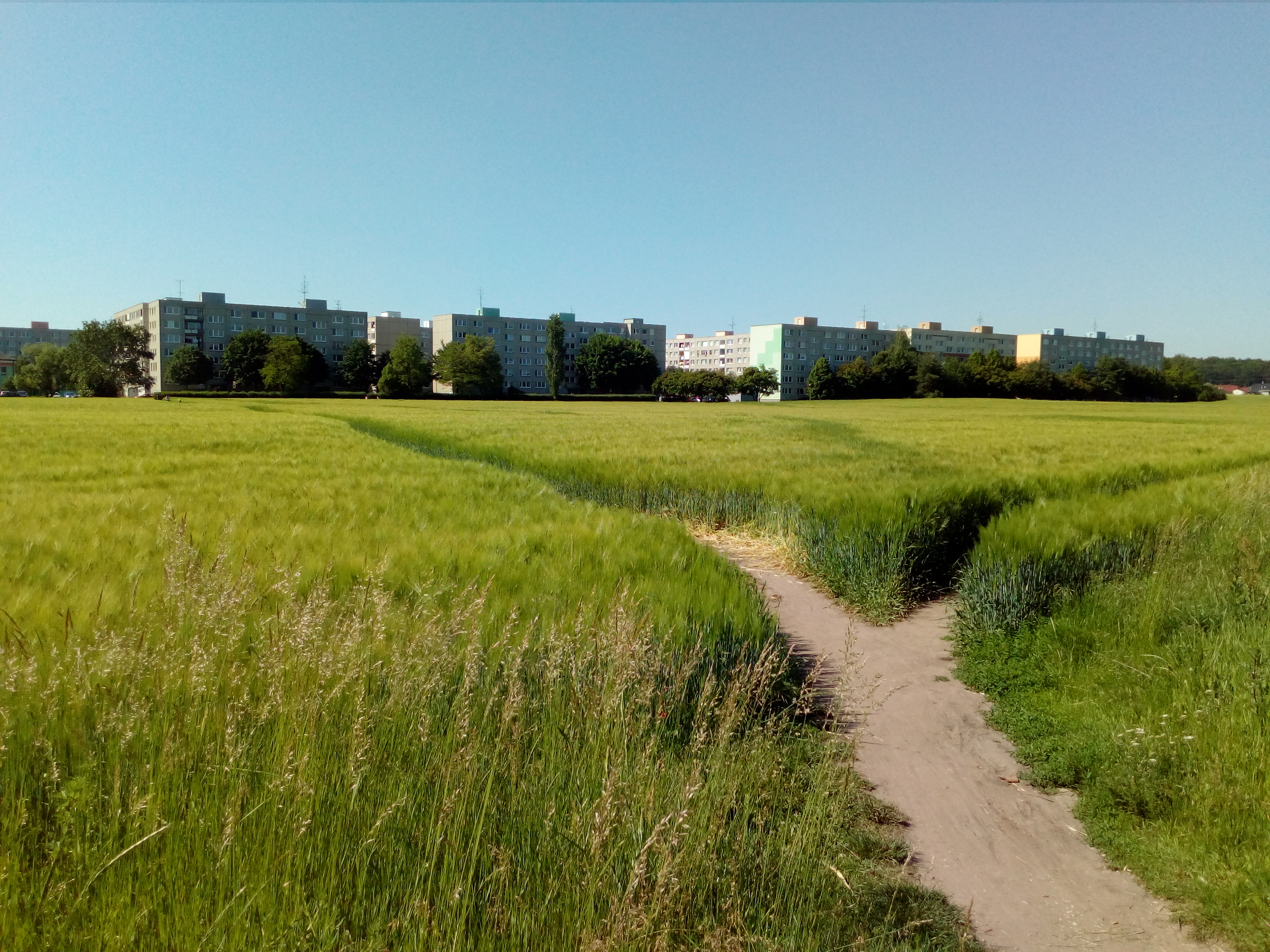 Sídliště Na Valtické v Břeclavi